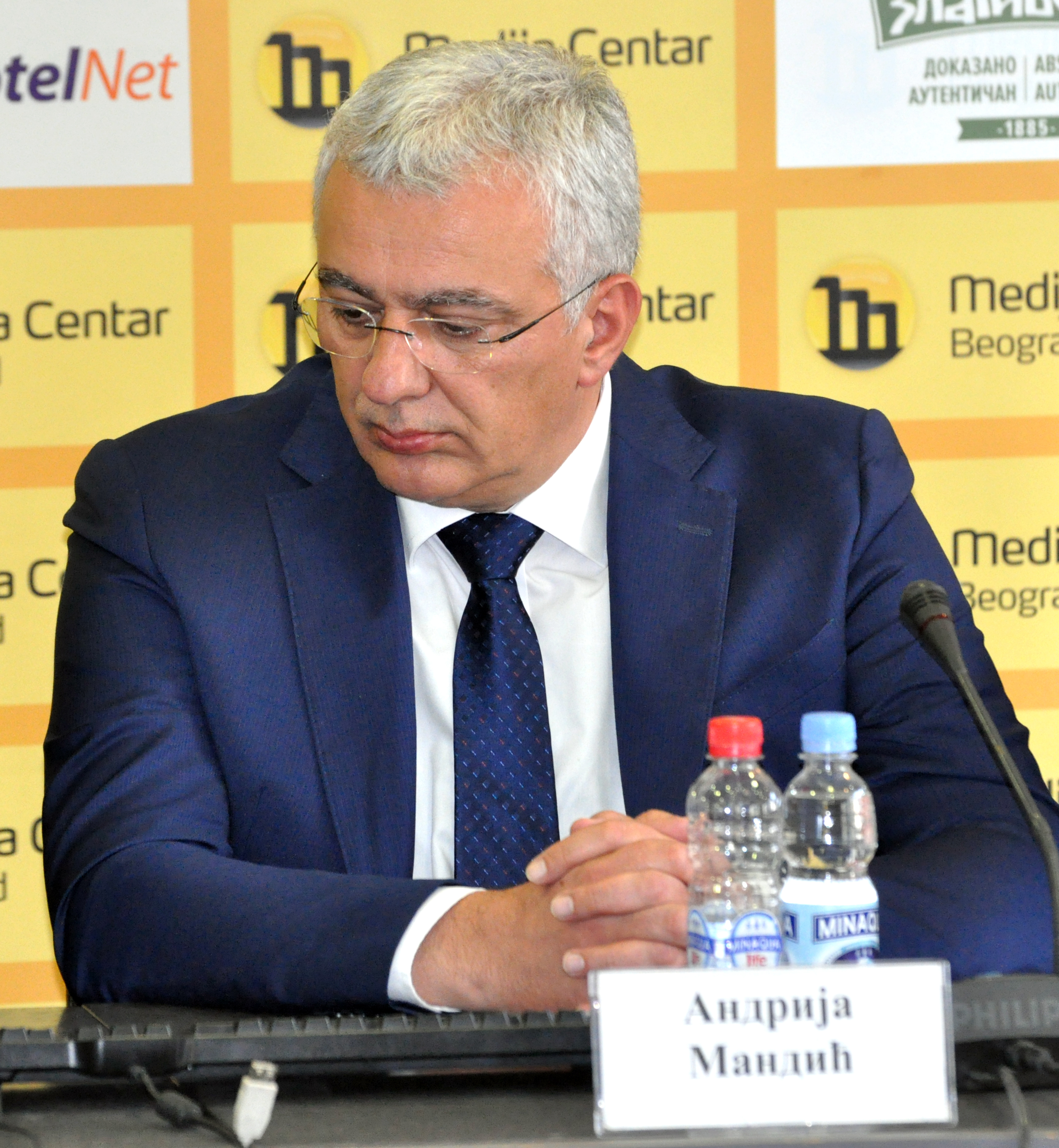 Андрија Мандић српски политичар из Црне Горе